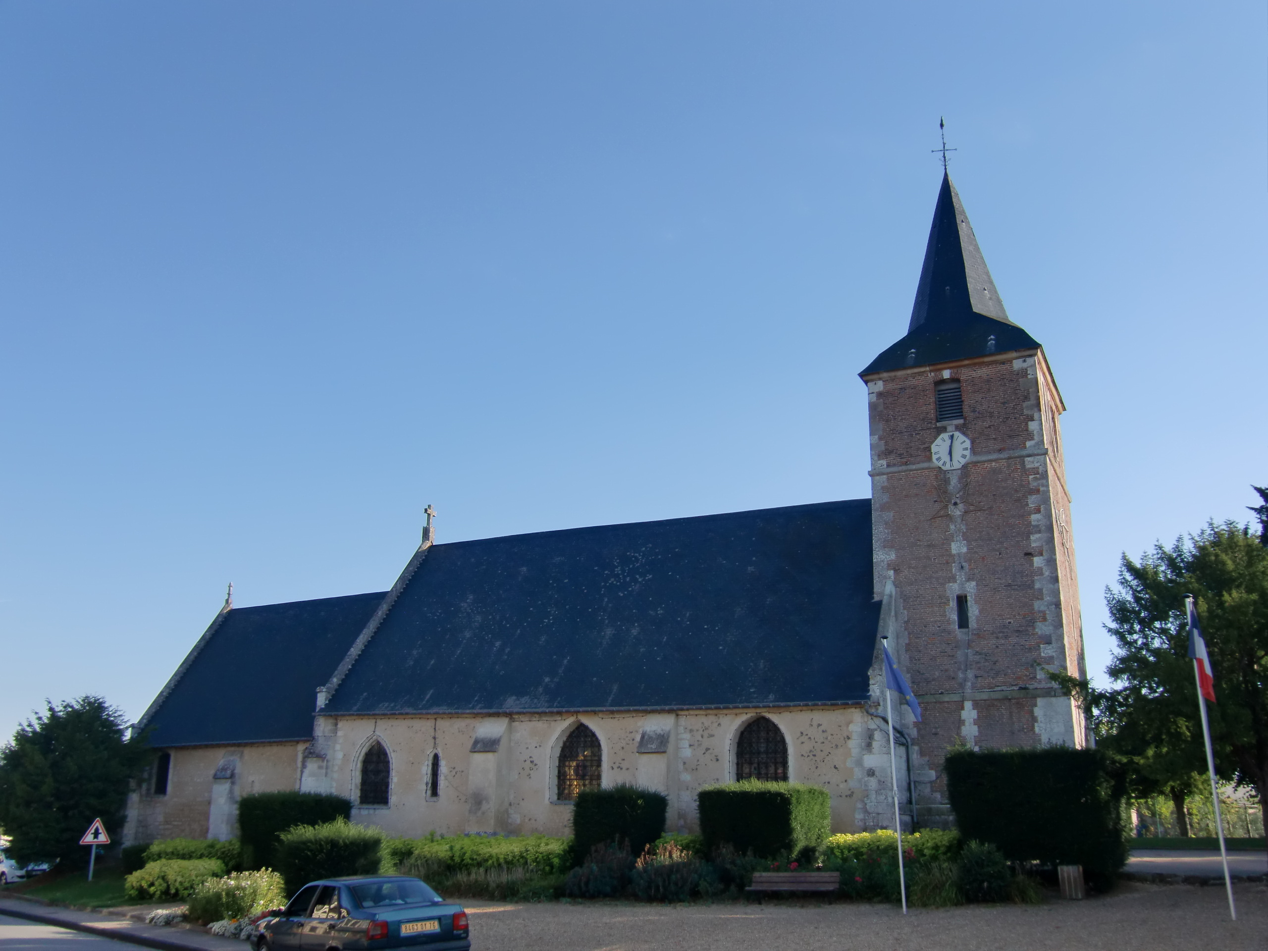 église de Conteville (Eure, Normandie, France)